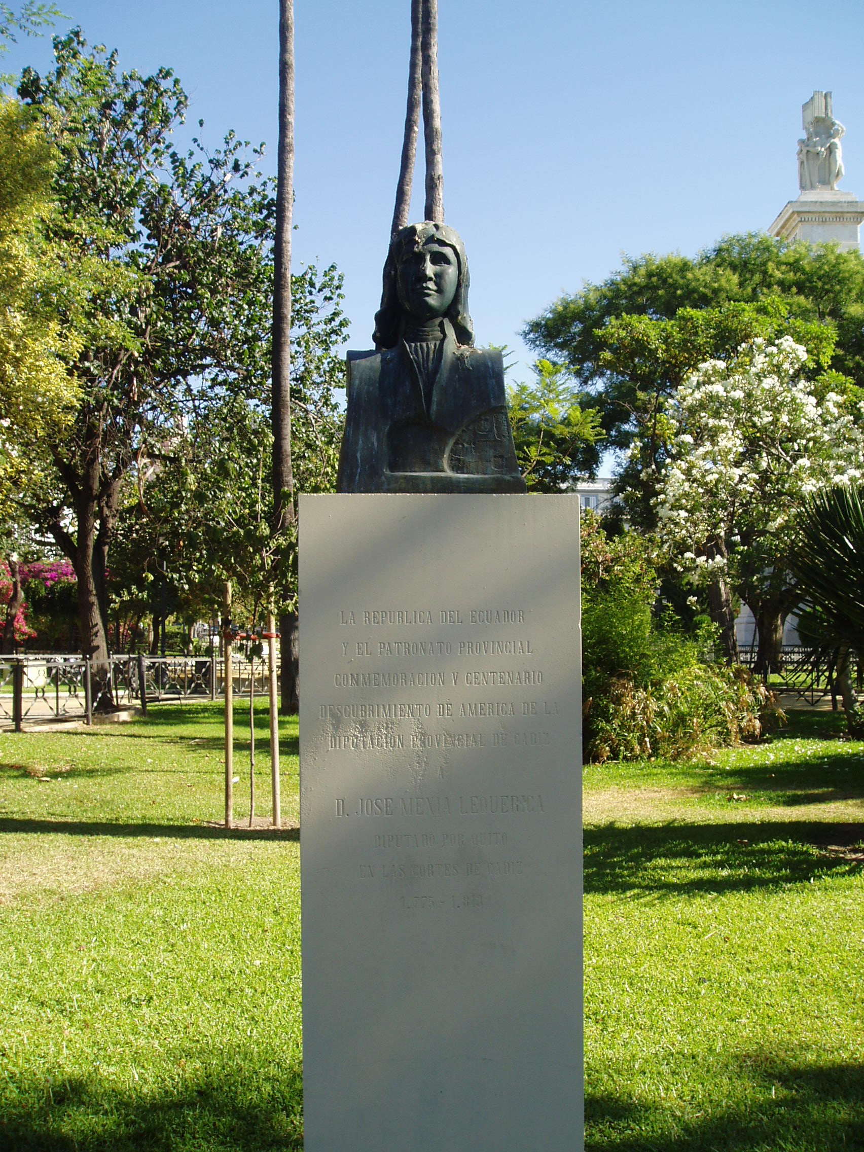 Busto dedicado al político ecuatoriano José Mejía Lequerica, diputado en la Cortes de Cádiz. Está situado en la Plaza de España de Cádiz.